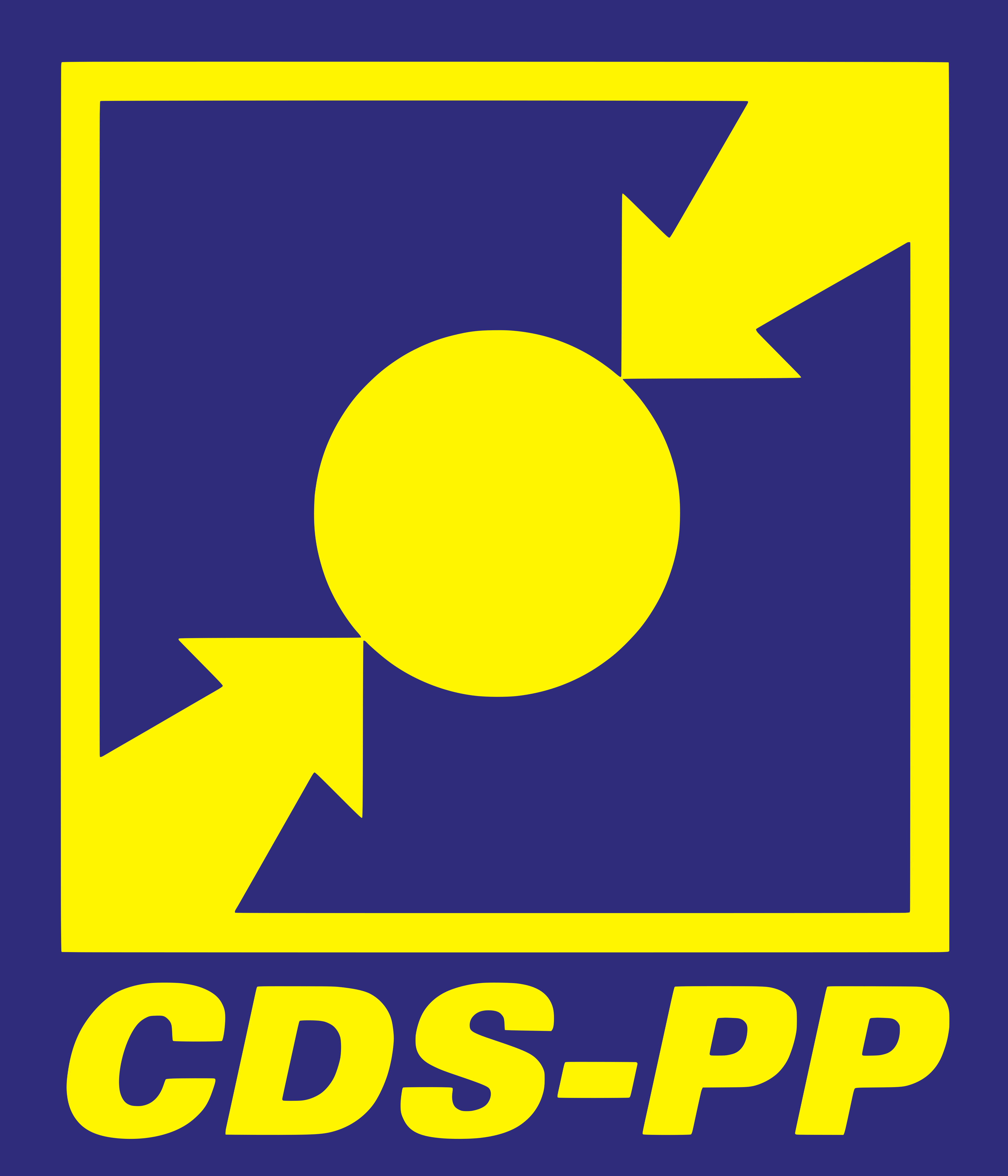 Logótipo do CDS-PP de 1993 a 2009